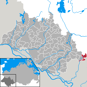 Brunow in Mecklenburg-Vorpommern - district Ludwigslust